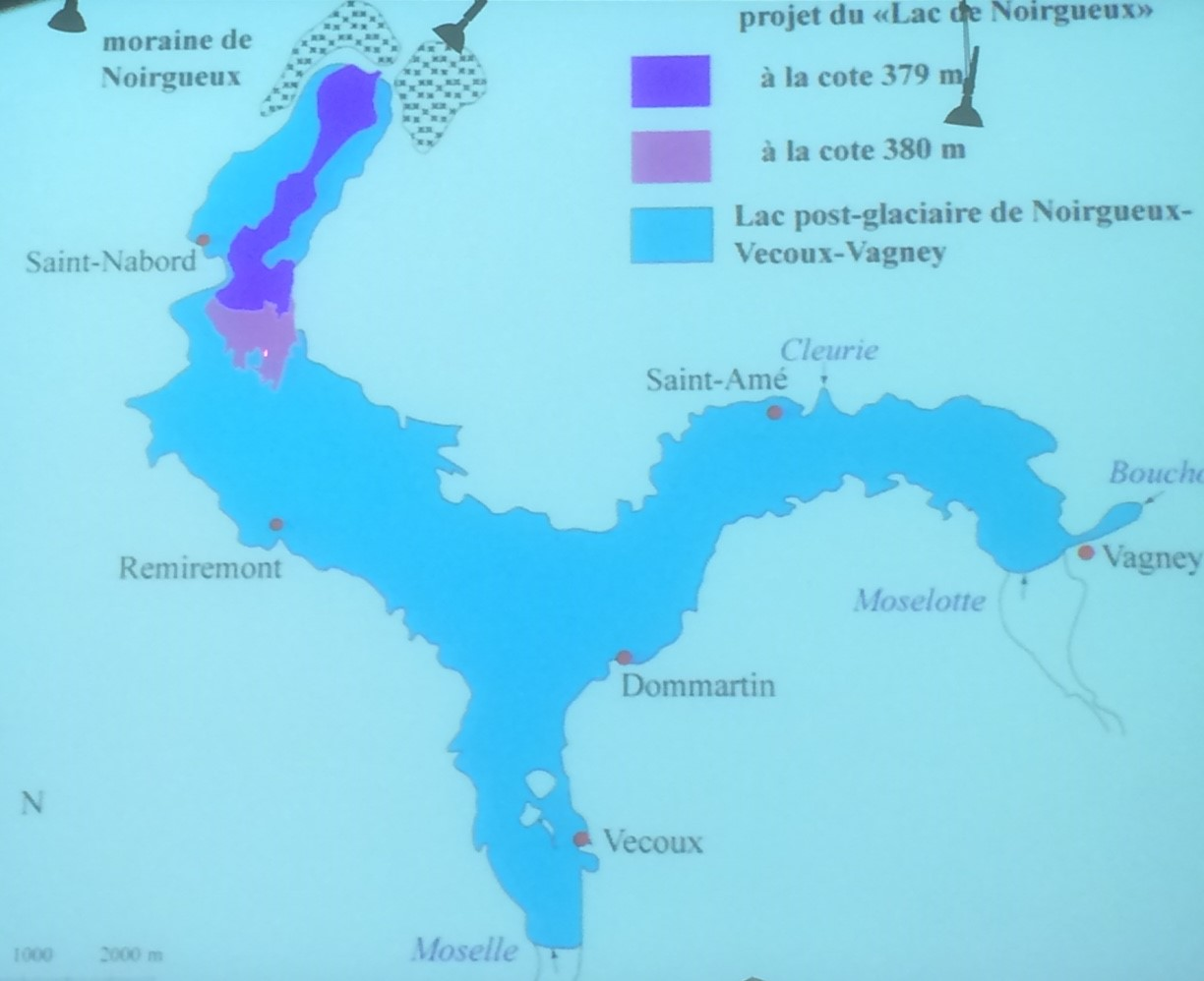 Vosges, Saint-Nabord-Saint-Étienne-lès-Remiremont. Paléo-lac de Noirgueux. Croquis du professeur Dominique Harmand avec indication du projet de lac aux cotes 379-380 par rapport à l'étendue initiale du glacier, de la formation du lac de Noirgueux – Vecoux – Vagney il y a environ 22 000 ans, et localisation de la Moraine de Noirgueux